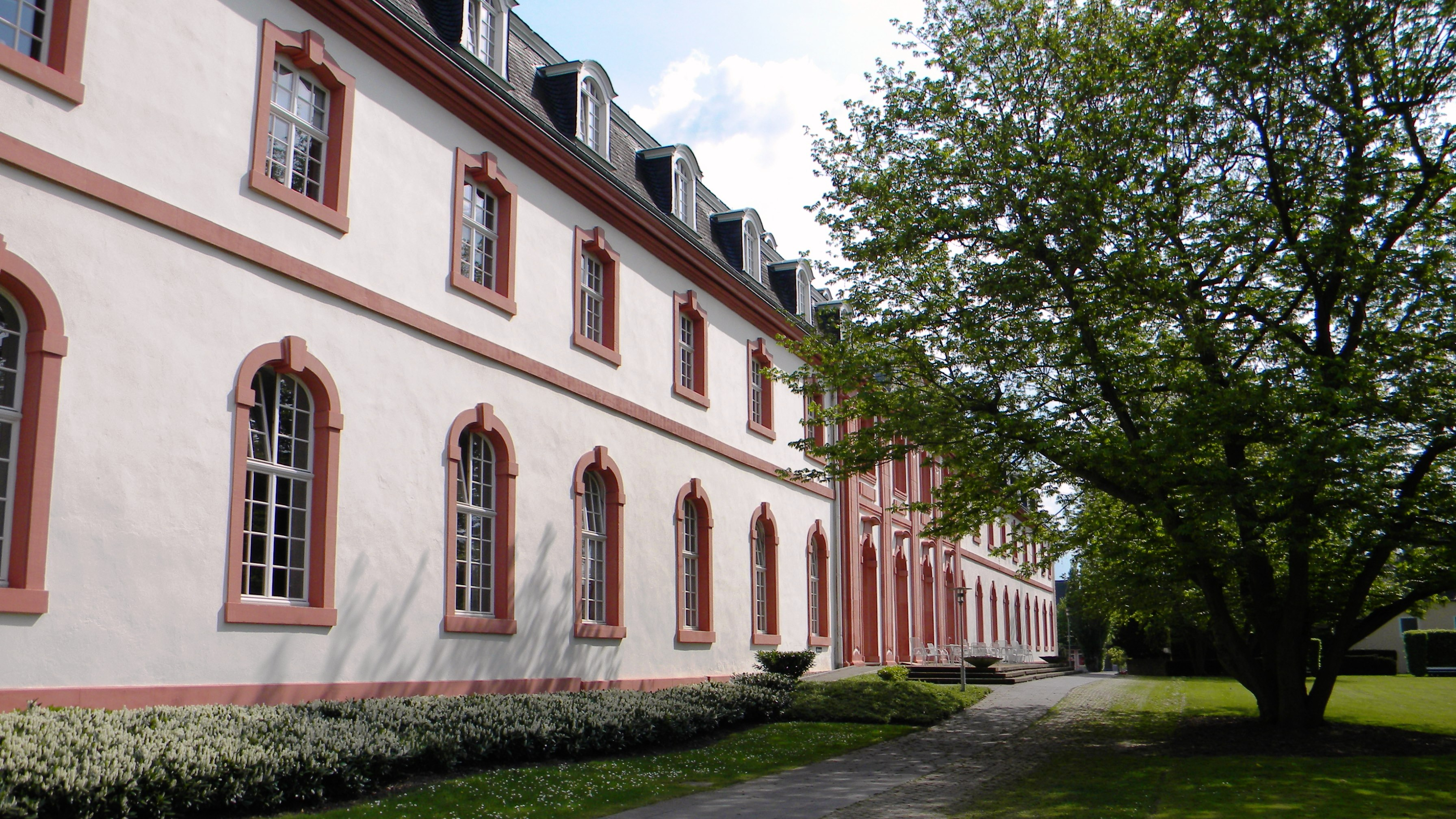 Irminenfreihof, Fassade vom Festsaal, Altenheim